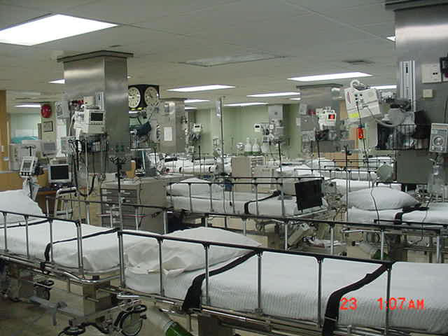 Raum zur reduzierten Intensivpflege an Bord von USNS Mercy (T-AH 19)